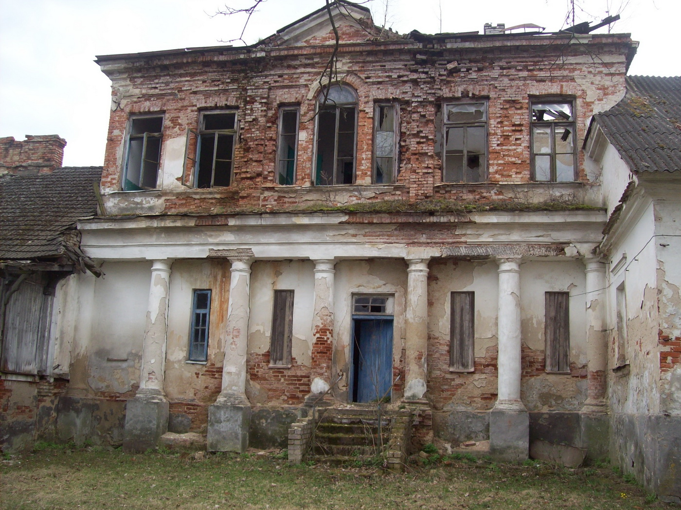 Беларуская (тарашкевіца): Былая сядзіба Трамбіцкіх (Інтэрнацыянальны). Галоўная частка фасаду левага крыла. 01 This is a photo of Belarusian heritage monument. Reference number: 113Г000610 ( WLM)